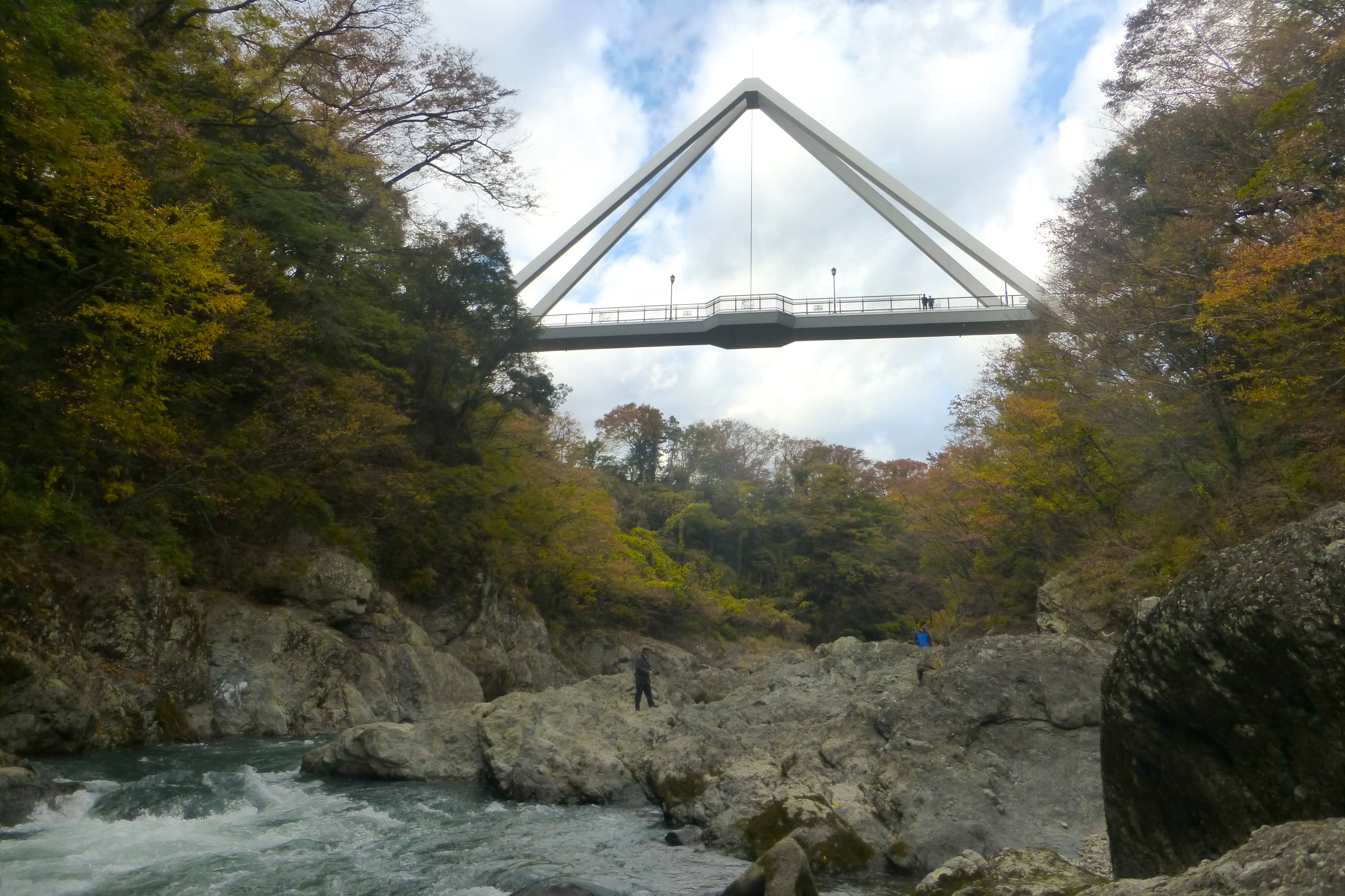 はねたき橋 (Hanetaki bridge)